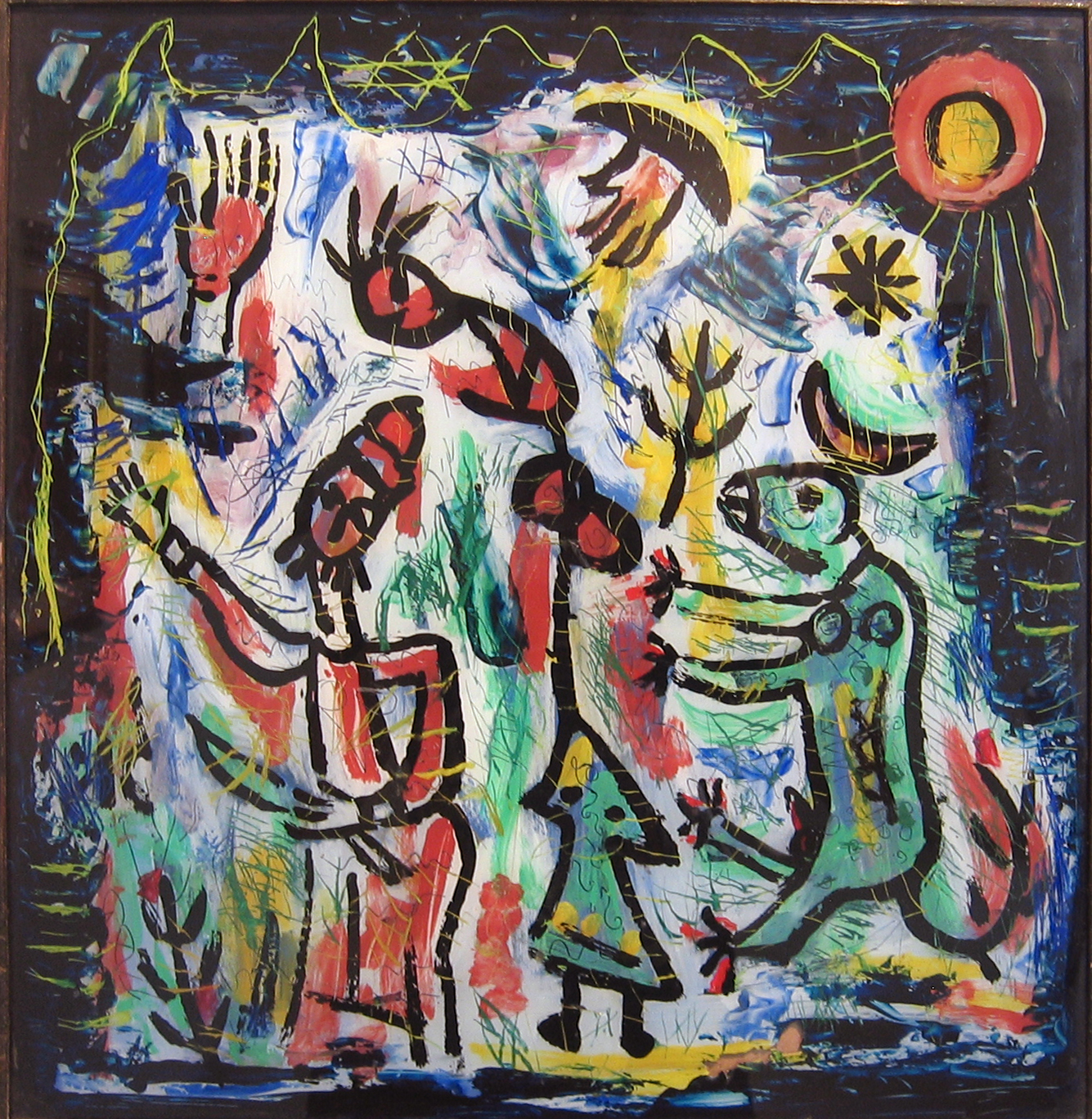 עקדת יצחק (1947) מאת משה קסטל. צבע על זכוכית, 46x45 ס"מ. מוזיאון קסטל.